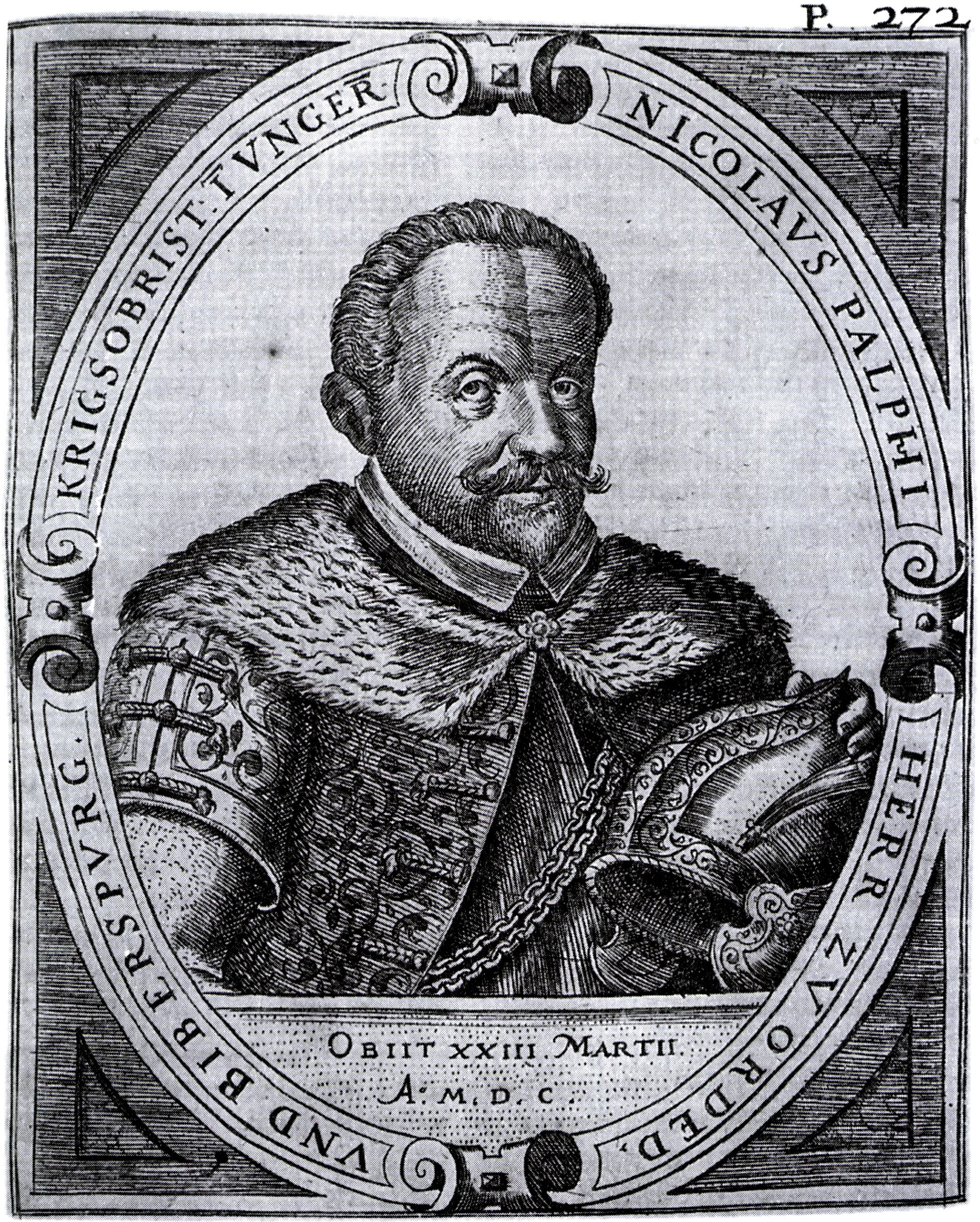 Portrait of Miklós Pálffy Published: Hieronymus Ortelius: Chronologia oder Historische Beschreibung aller Kriegsempörungen und Belagerungen in Ungarn auch in Sibenbürgen von 1395, Nuremberg, 1603